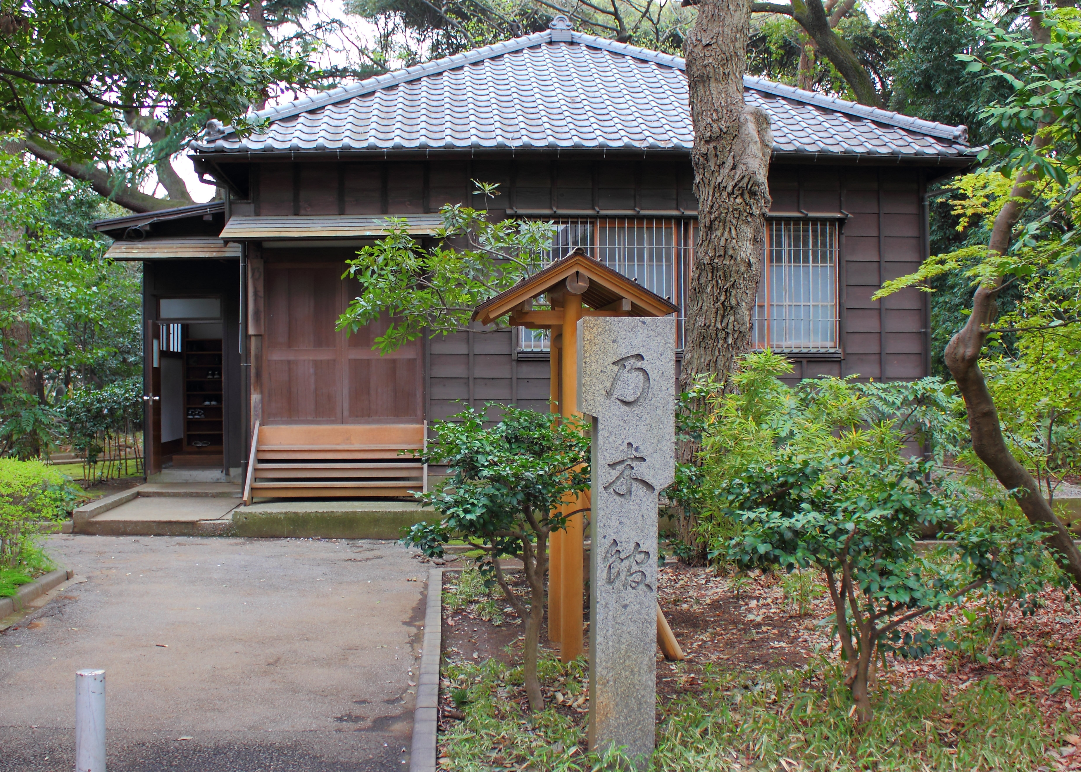 学習院大学、乃木館（旧総寮部）1901年建造。国登録有形文化財。